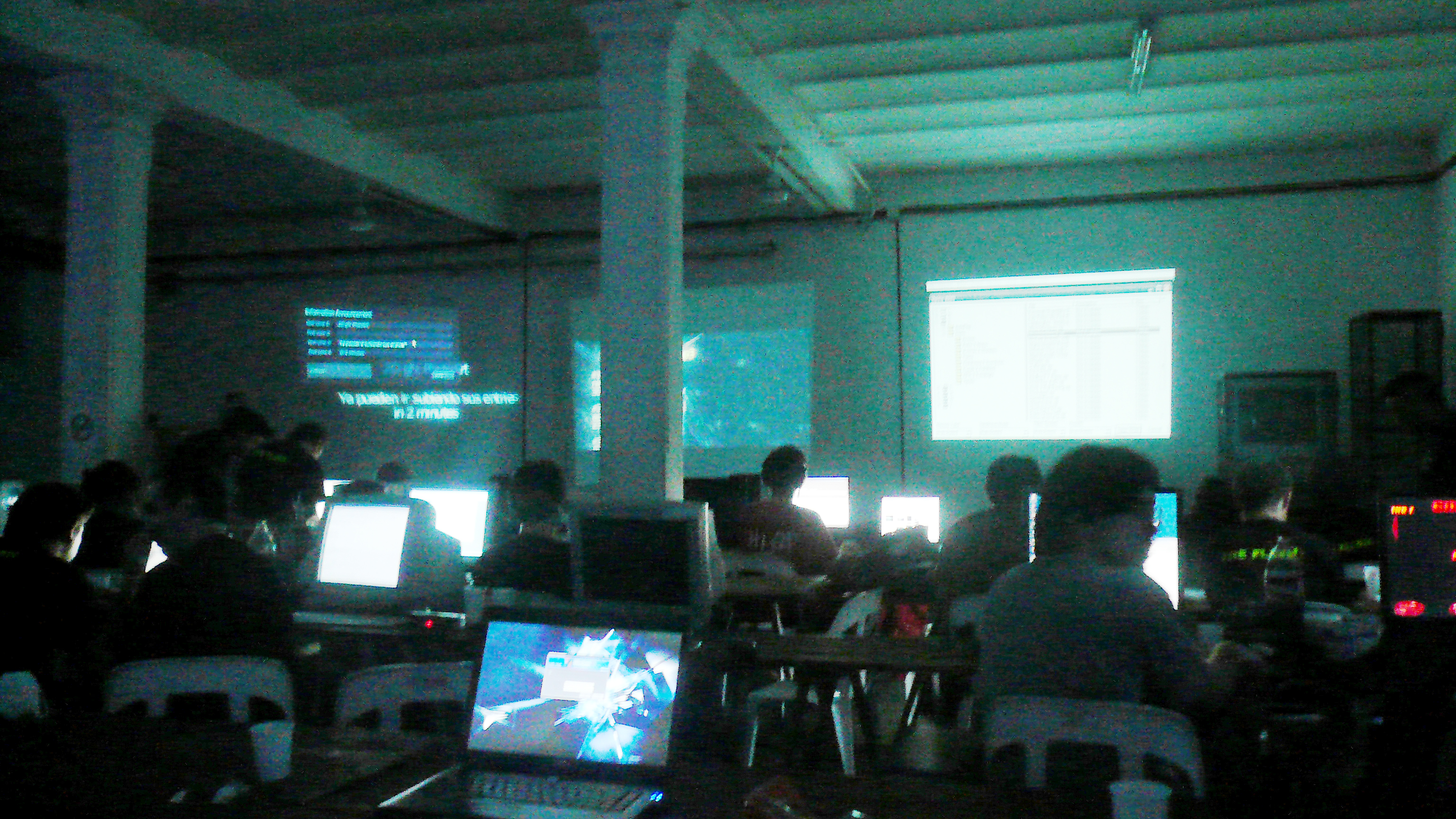 Evento FlashParty 2007 en la Ciudad de Buenos Aires, Argentina